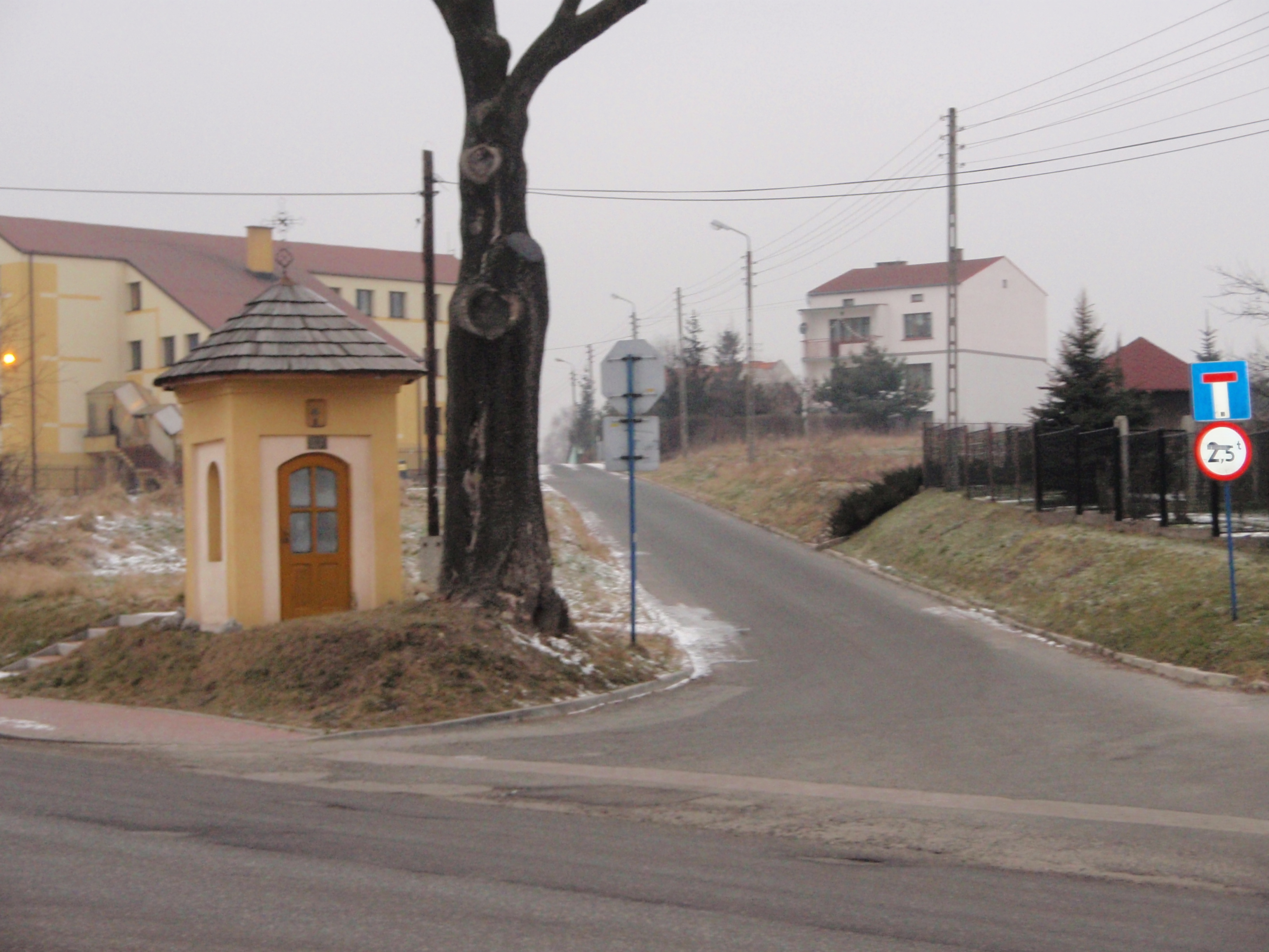 Sławków, woj. śląskie - ul. Łosińska